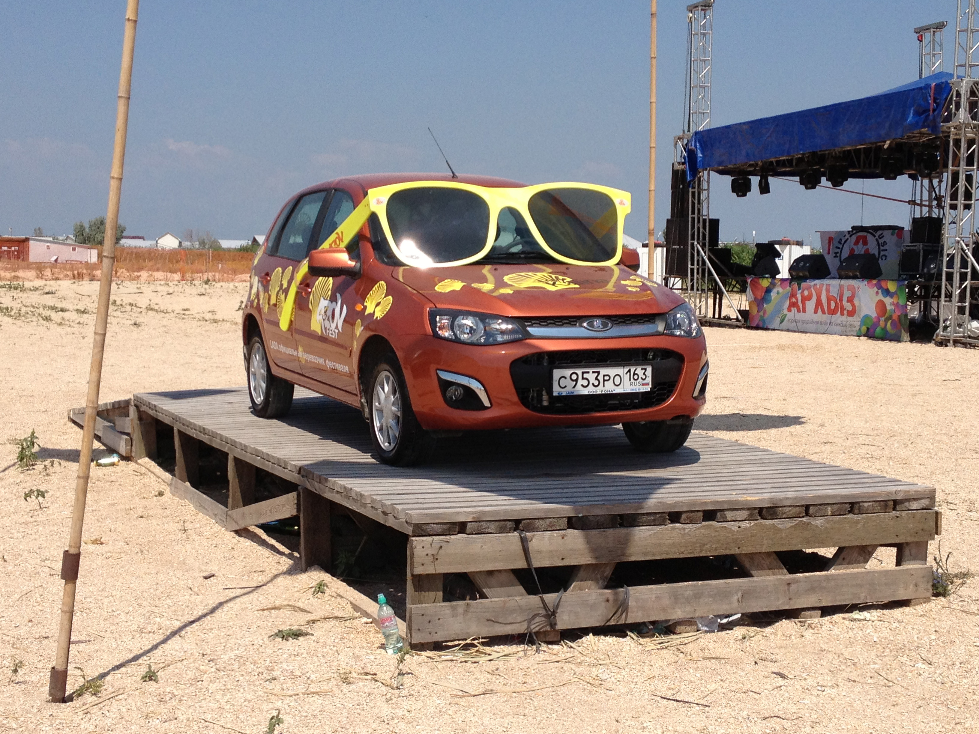 Фестиваль A-ZOV, автомобиль ЛАДА Калина-2